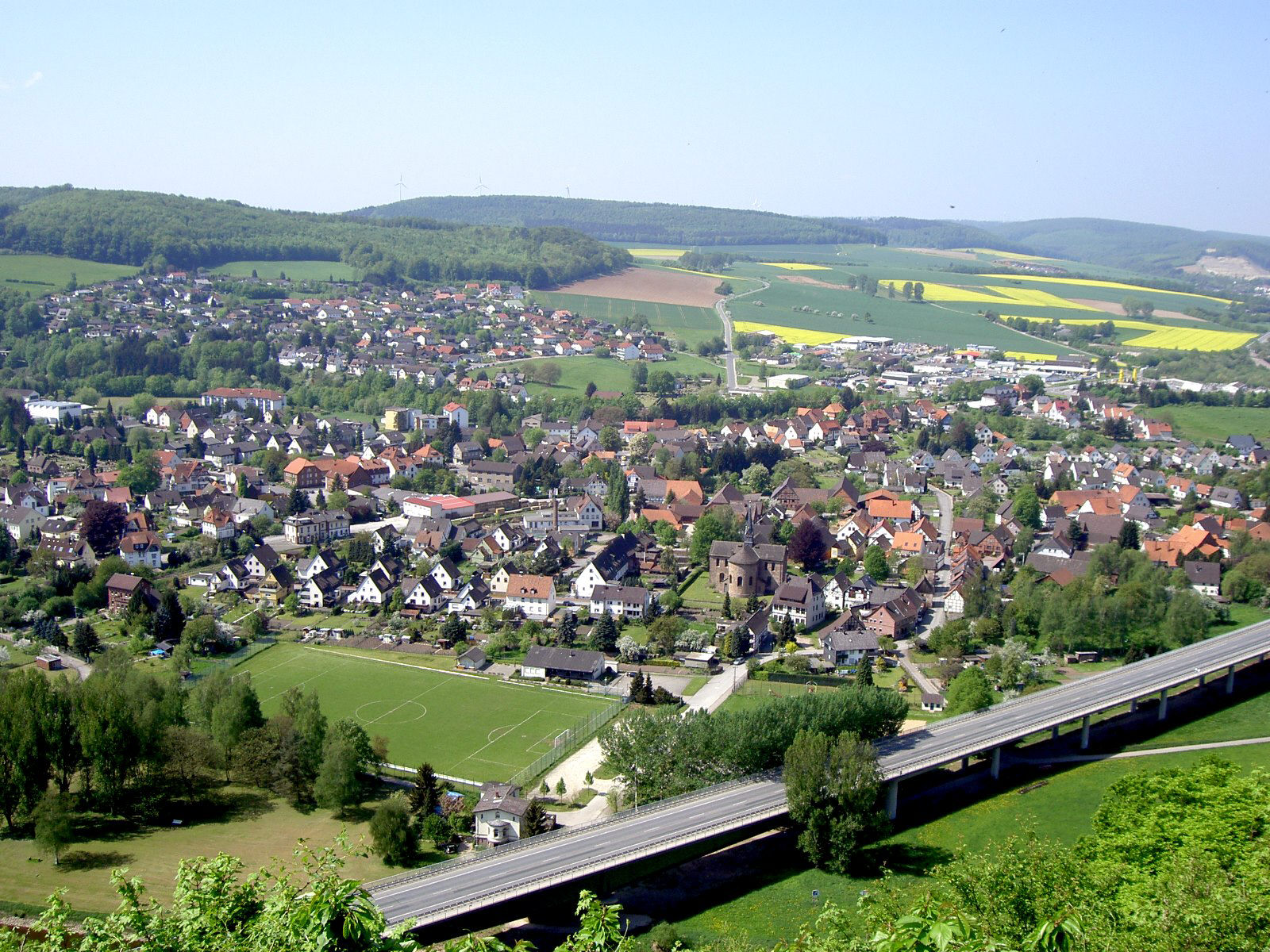 Stadt Bodenwerder - Ortsteil Kemnade - in Niedersachsen, Deutschland